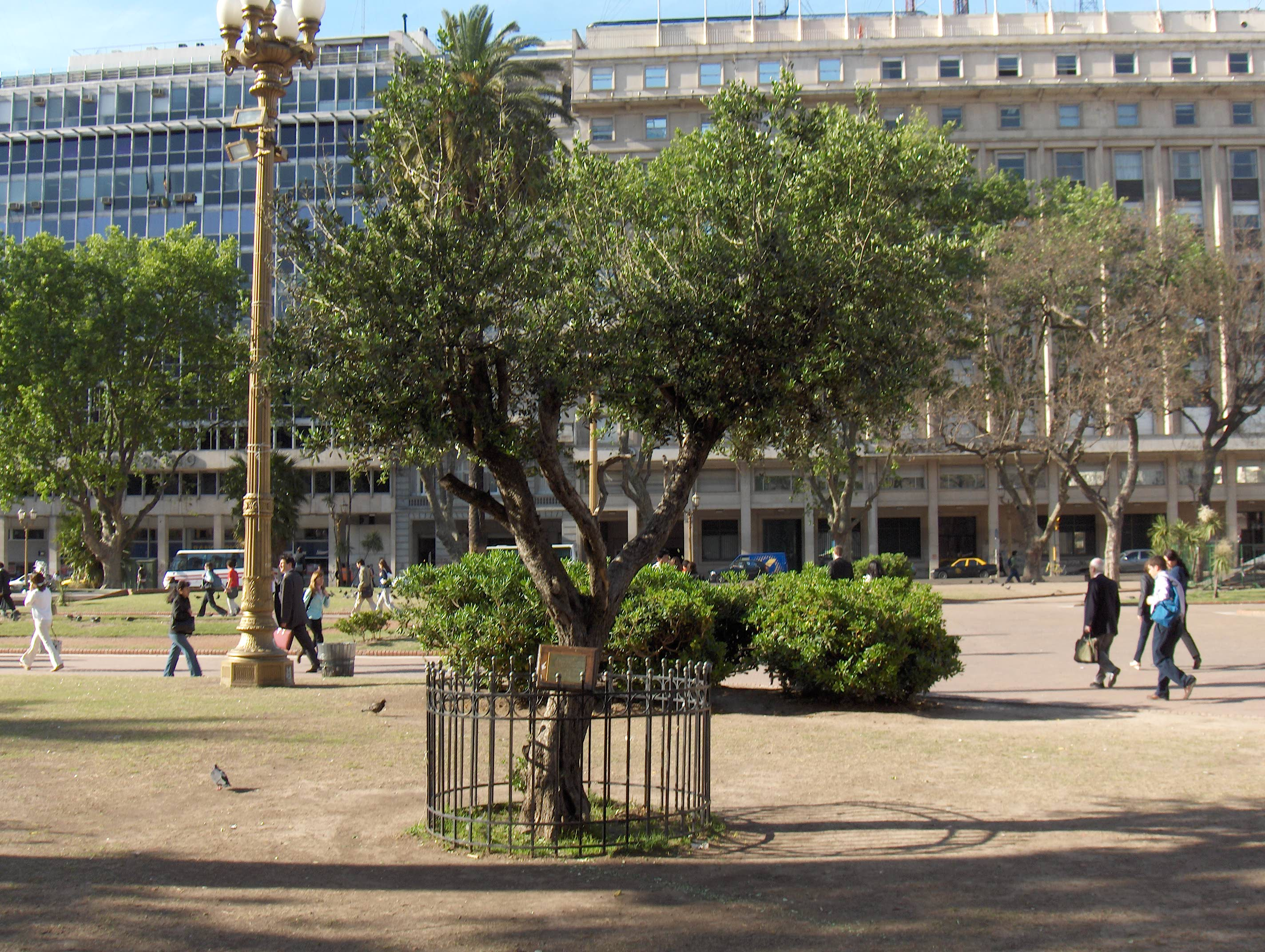 Olivo plantado el 29 de Marzo del año 2000. Su placa tiene inscripto "Entre todos Educar para la Paz y la Esperanza. Este olivo ofrecido por el Arzobispado de Buenos Aires fue plantado simbólicamente en la Plaza de Mayo como signo y compromiso de una Educación Entre Todos y Para Todos, por autoridades de la Nación y de la Ciudad y Representantes de las Comunidades Educativas de Buenos Aires en un acto interreligioso y ecuménico". Plaza de Mayo, Ciudad Buenos Aires, Argentina.